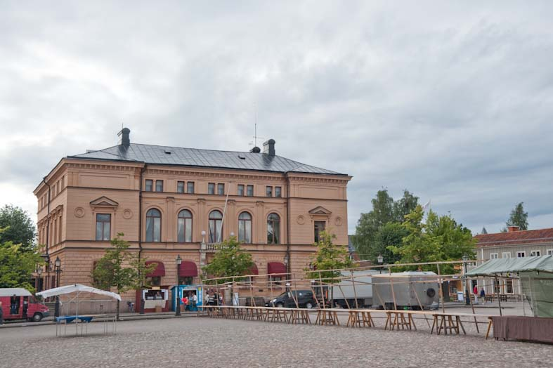 Nora Stadshotell. Återfotografering av bild nr DB0384 från 1950-talet. Motiv: Nora Nyckelord: Riksintressen Kategori: Stadsmiljö, Hotell Nora Stadshotell. Återfotografering av bild nr DB0384 från 1950-talet.